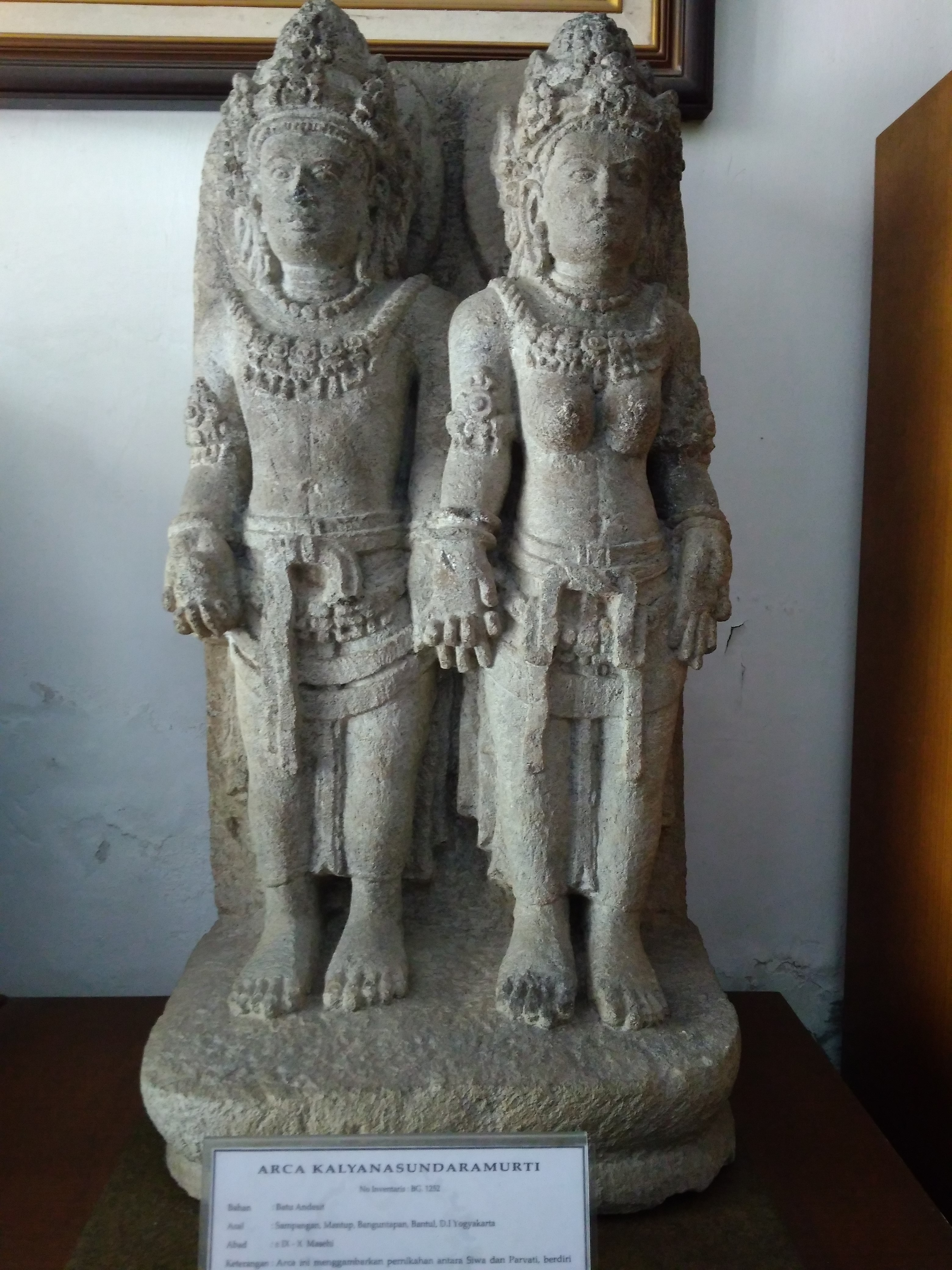 Arca Kalyanasundaramurti, ditemukan di Situs Mantup. Saat ini arca disimpan di BPCB DIY.